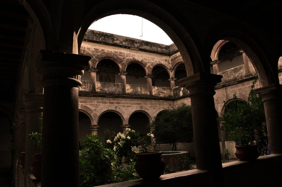 Claustro Monasterio, Category:Tepeapulco, Hidalgo